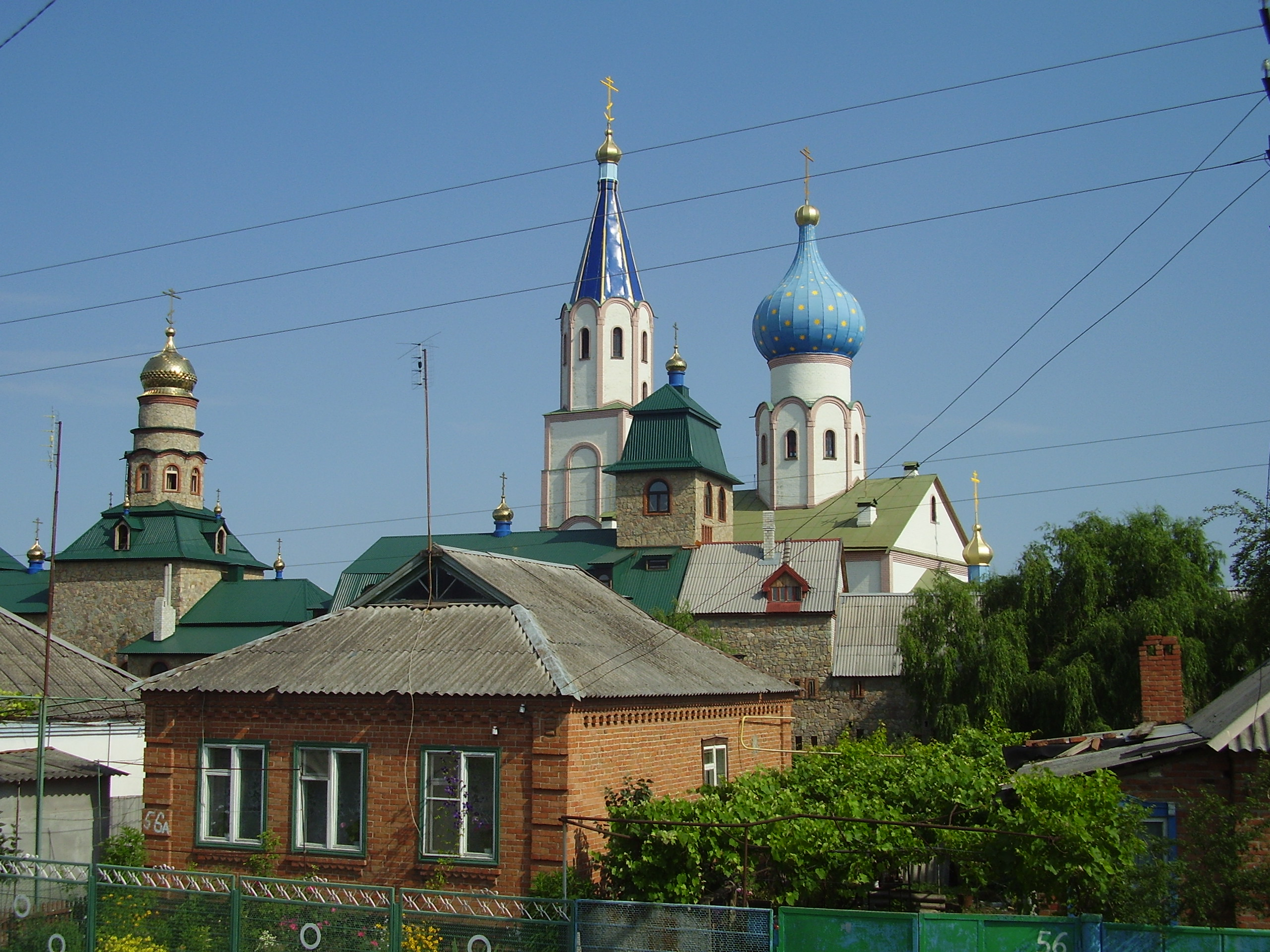 город Тимашёвск. Вид на Свято-Духов монастырь.